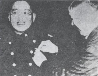 미군정장관 러치 로부터 표창을 수여받는 장택상